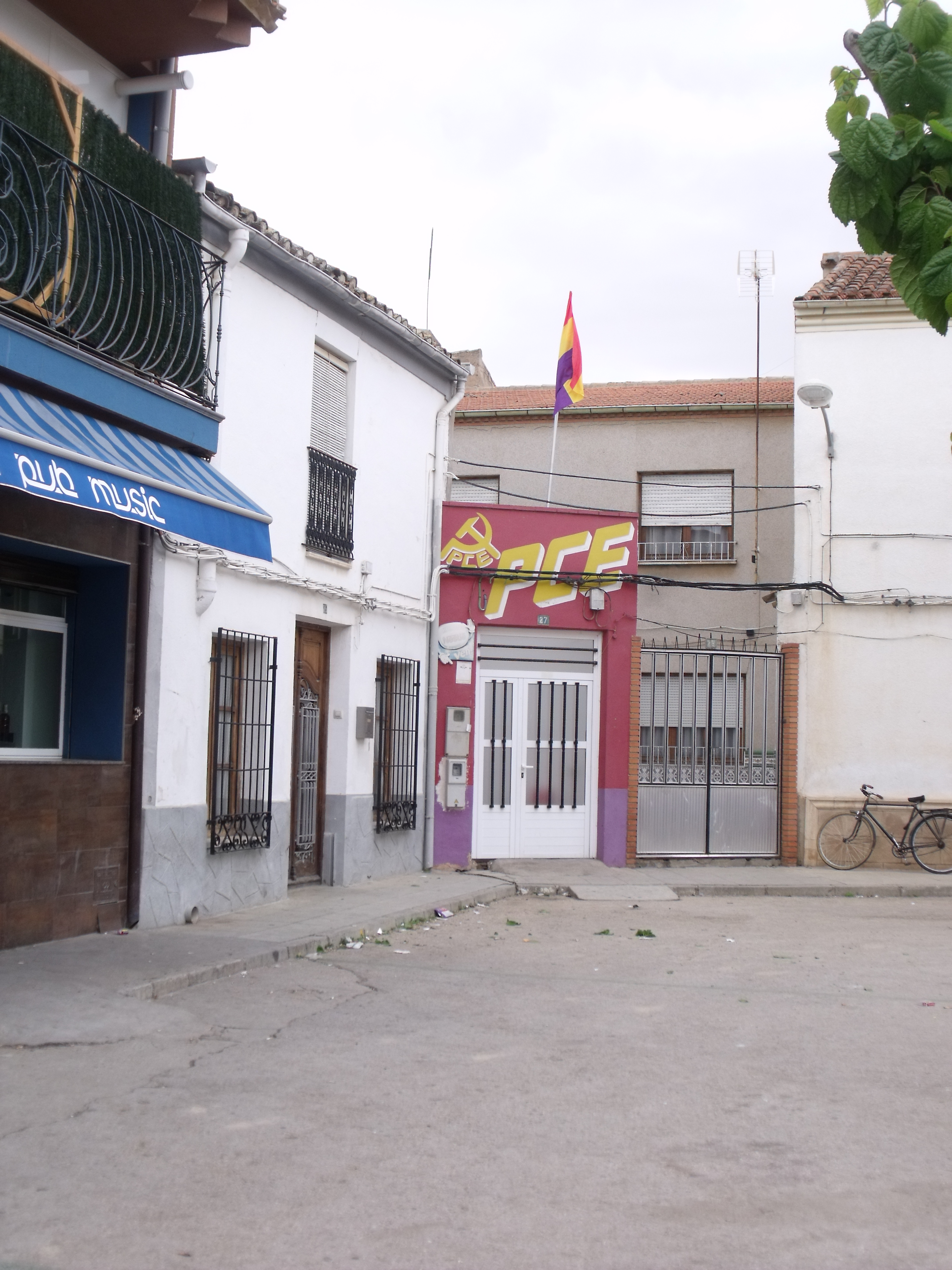 Sede del PCE